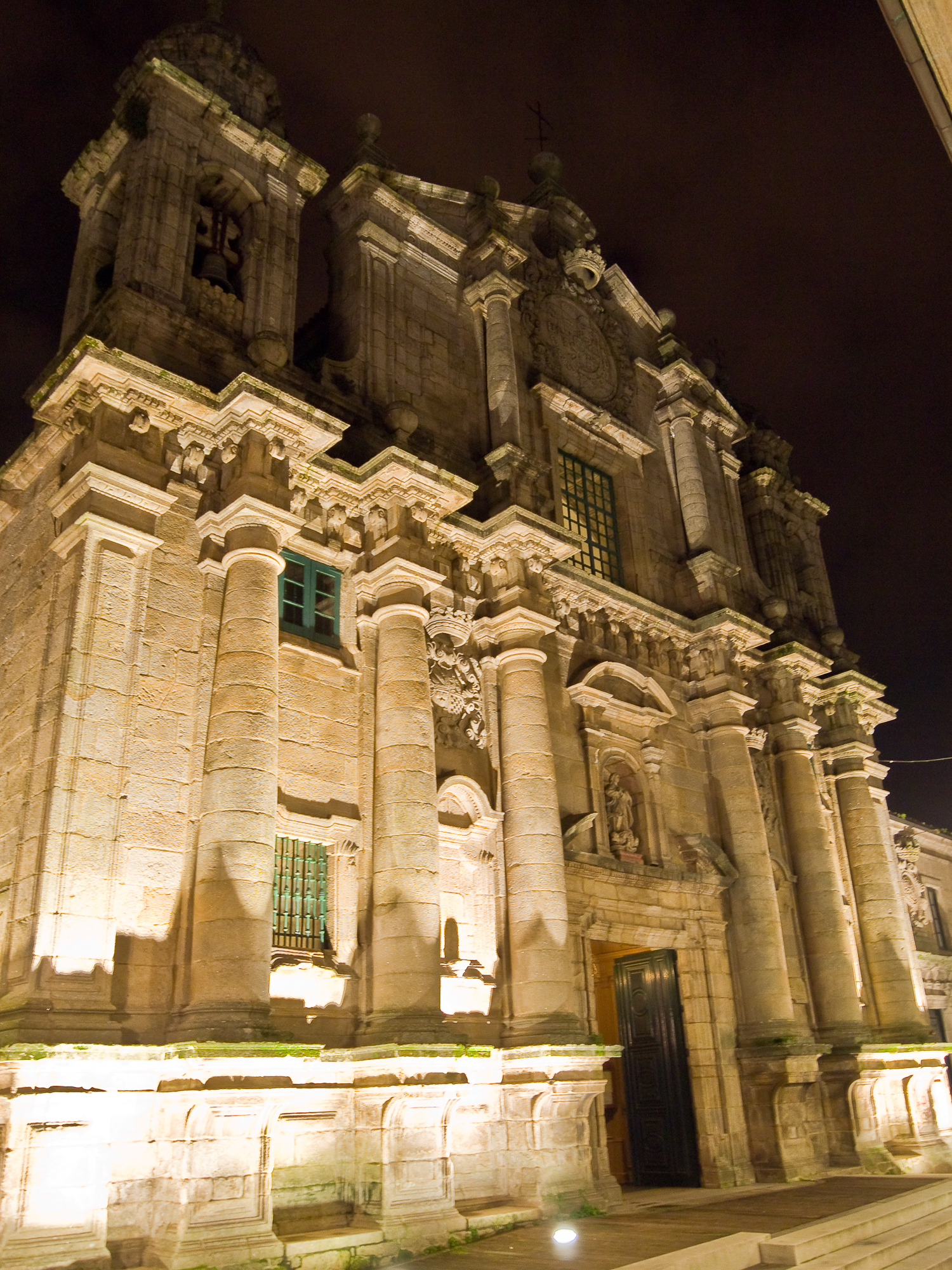 Igrexa de San Bartolomé, Pontevedra.